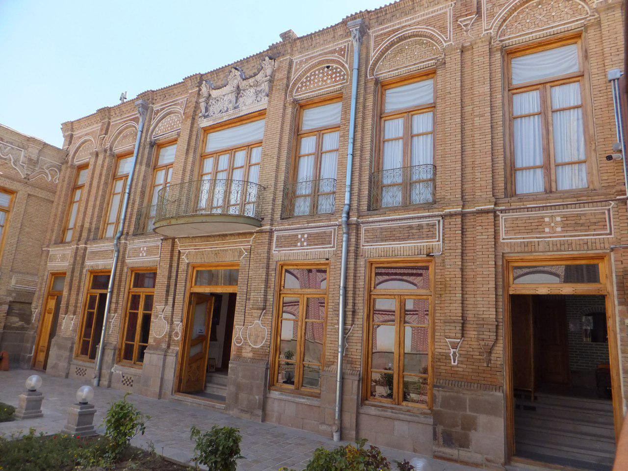 خانه امیرپرویز